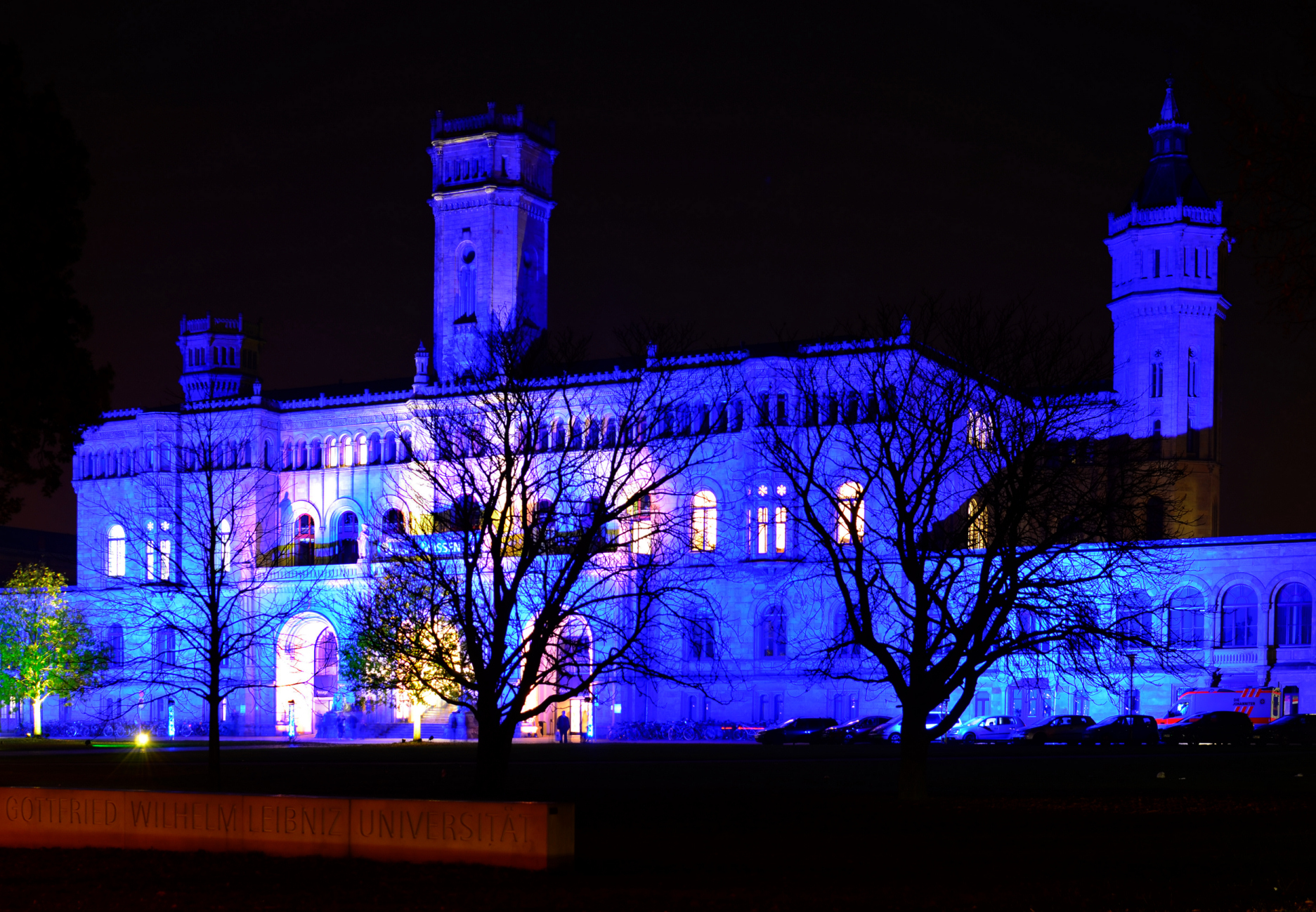 Die Nacht, die Wissen schafft 2016, Uni Hauptgebäude, illuminiert